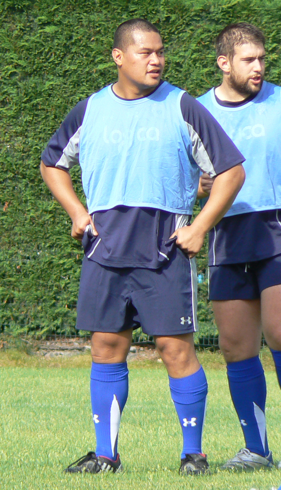 Le rugbyman néo-zélandais Ti'i Paulo lors d'un entrainement avec l'ASM Clermont Auvergne.